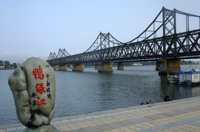 丹东鸭绿江大桥